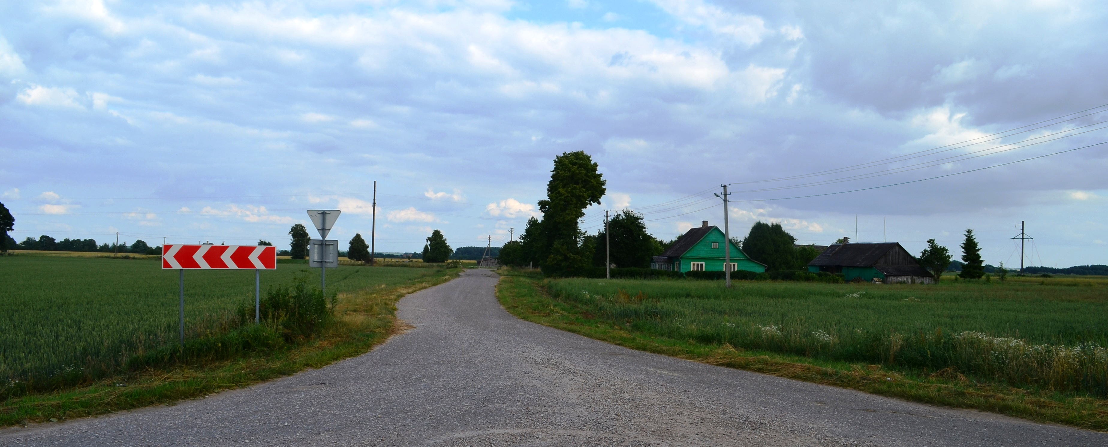 Kampai II, kelias link Bajėnų II, Kėdainių raj.